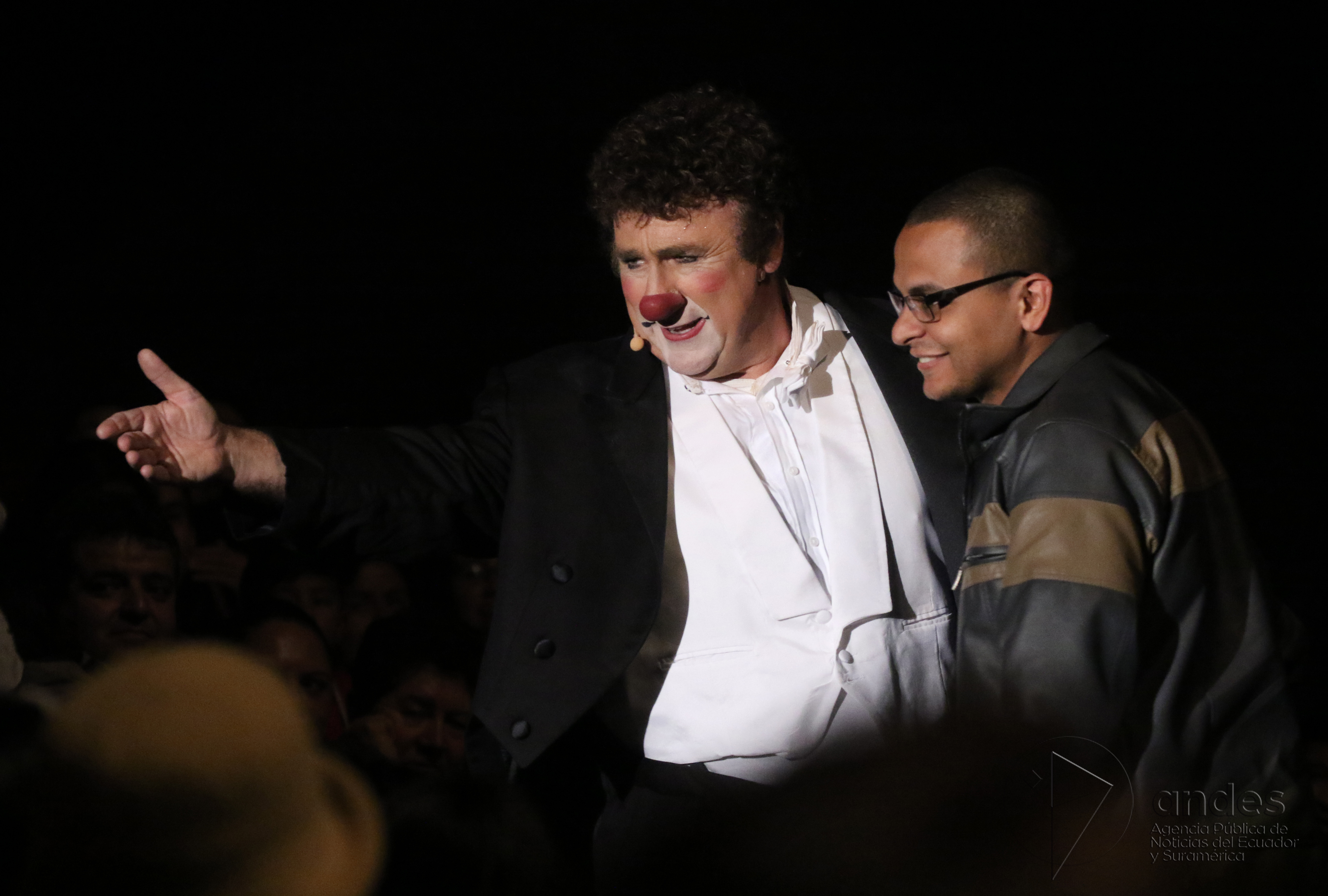 Quito, 10 de junio del 2017 (Andes).- Es uno de los tres payasos que han recibido el “Clown de Oro” del Festival de Montecarlo en toda la historia es por ello catalogado como el mejor payaso del mundo, a pesar de ello, David Larible es un artista sencillo, entregado por completo a su profesión y al público, es un clown que nunca deja de aprender. David Larible presentó por primera vez en el Ecuador su espectáculo “The clown of clowns” en la Casa de la Cultura Ecuatoriana de Quito. Una hora y media de risas y diversión en un show que diseñado para el disfrute de todos. ANDES/Micaela Ayala V.